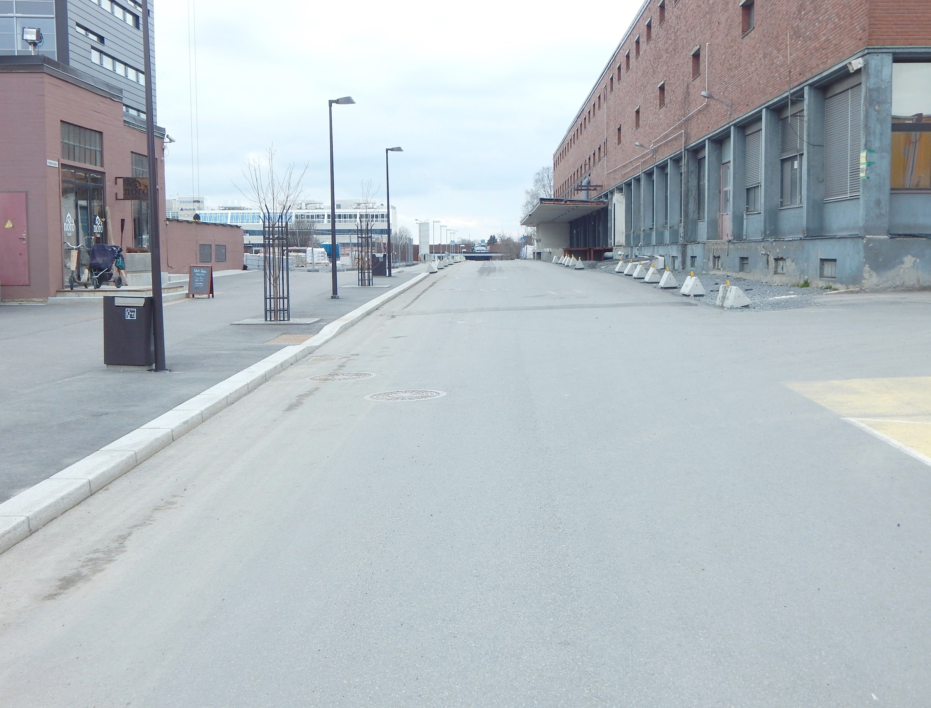 Bøkkerveien (tidligere Anders Winsvolds vei)